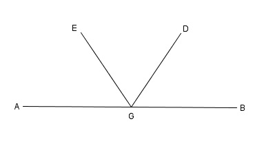 Il·lustració d'una de les proposiciones de les Data d'Euclides